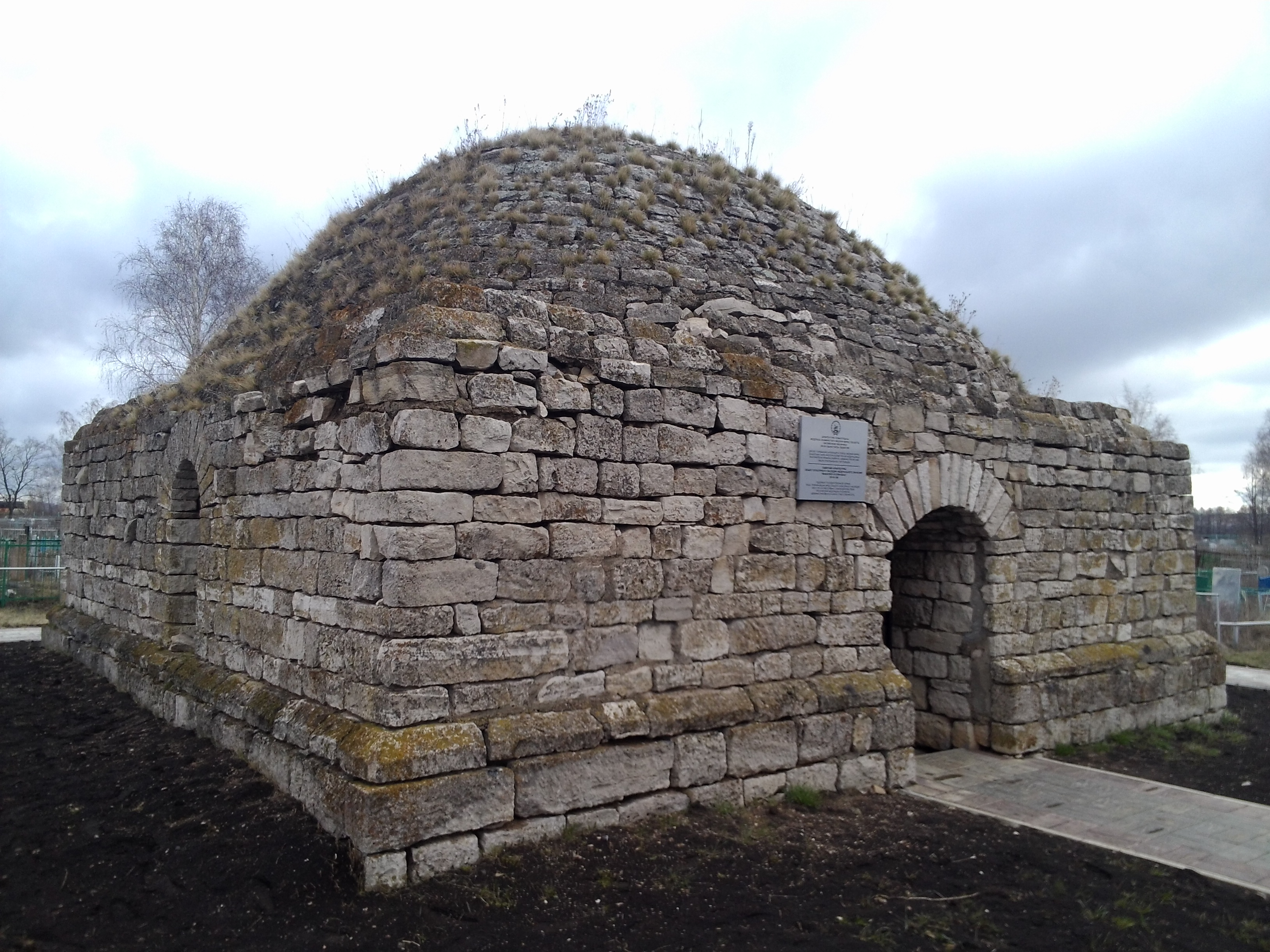 Мавзолей Хусейн-бека (Республика Башкортостан, посёлок Чишмы, восточная окраина поселка, левый берег р. Дема)